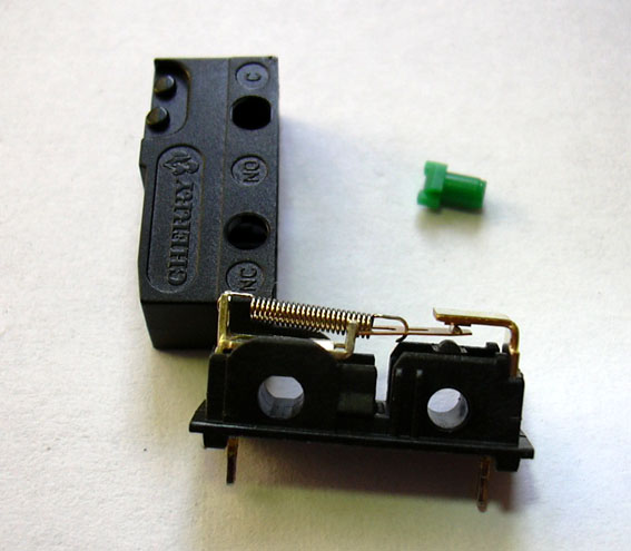 Beschreibung: Cherry Mikroschalter (geöffnet) Quelle: Fotografiert am 02.02.2005 Fotograf: Benutzer:Winfried Mueller Copyright Status: GNU Freie Dokumentationslizenz